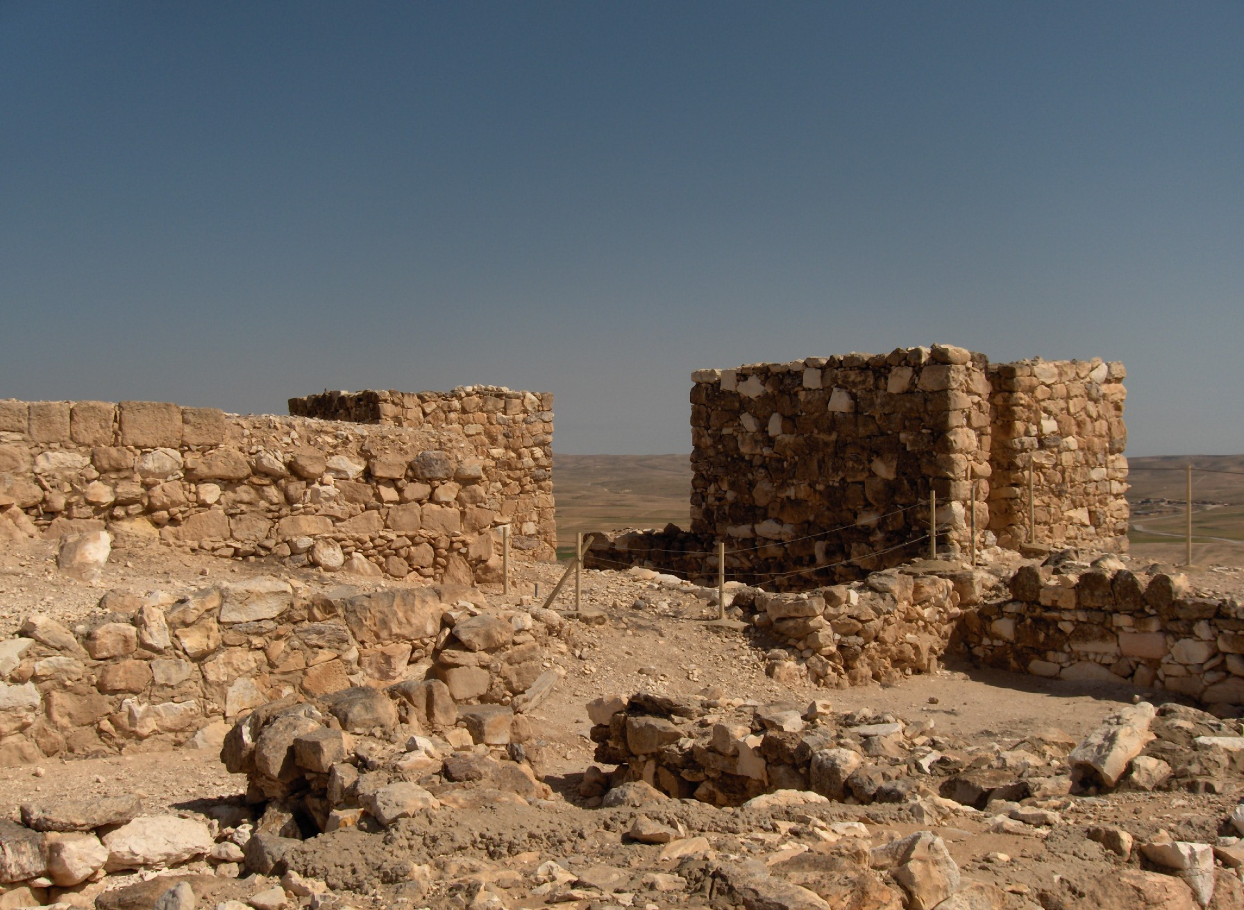 Site archéologique d'Arad, Israël